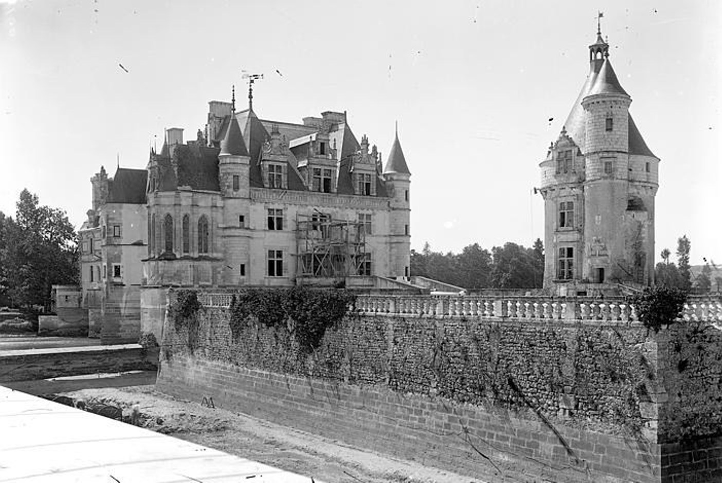 Le grand balcon de la façade est reconstruit avec ses balustres et pilastres de pierre. Au premier plan, les douves sont creusées et consolidées. Architecte : Félix Roguet, disciple d'Eugène Viollet-le-Duc. Période : 1866 à 1878.